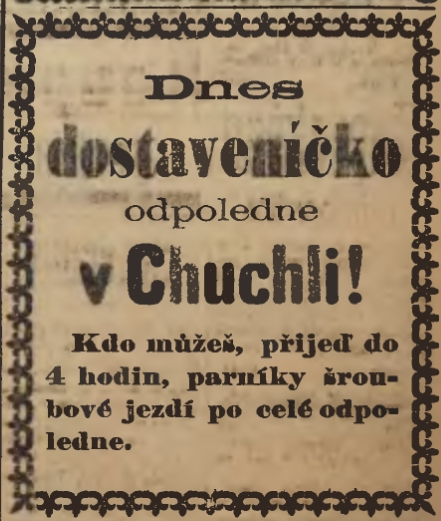 Prager tschechischsprachige Tageszeitung "Národní listy" vom 28. Juni 1881, Ausschnitt von Seite 3 (deutsch: Heute nachmittags Stelldichein in Kuchelbad, wer kann, der komme bis 4 Uhr, die Schraubendampfer verkehren während des ganzen Nachmittags).